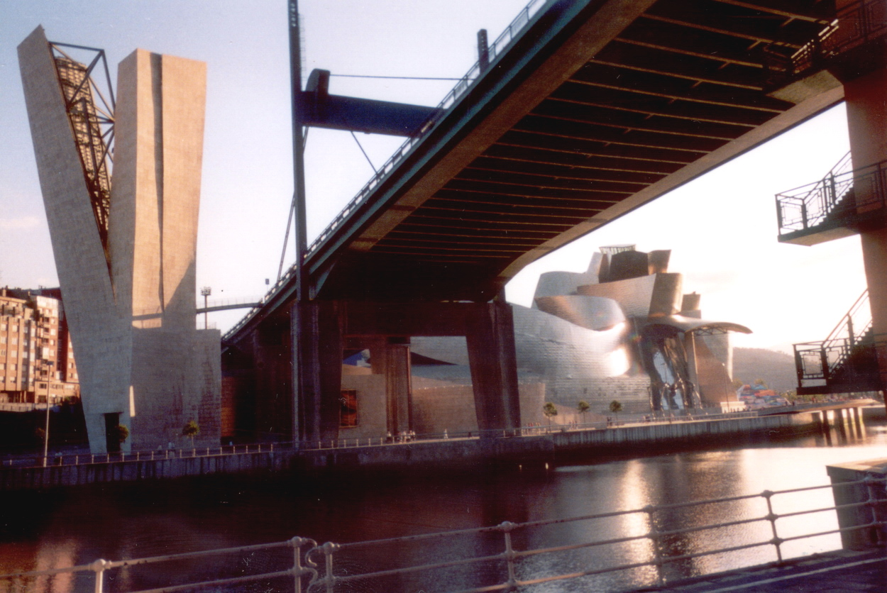 Guggenheim Museum in Bilbao, taken by Simone Urbinati on 4 august 2005.